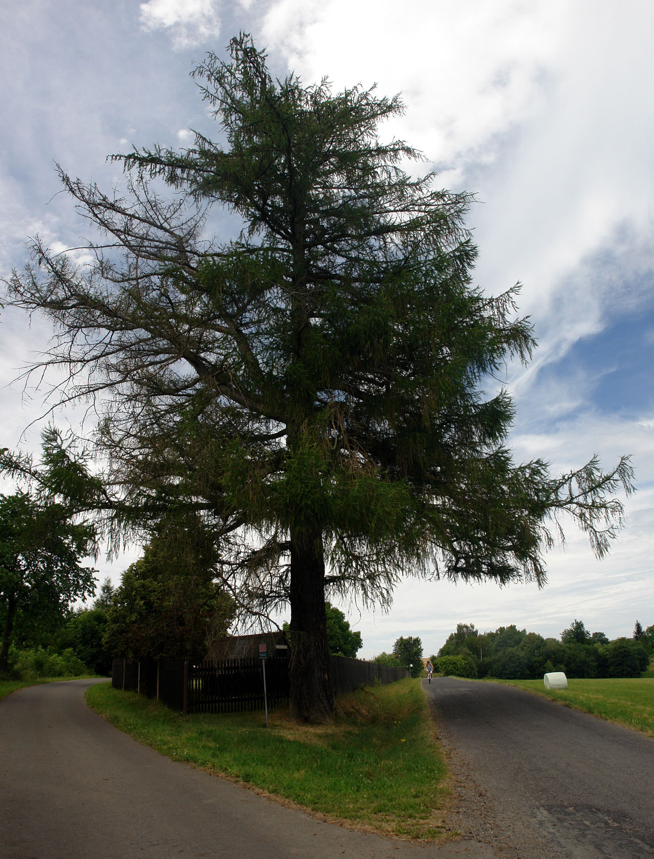 Památný Polžický Modřín